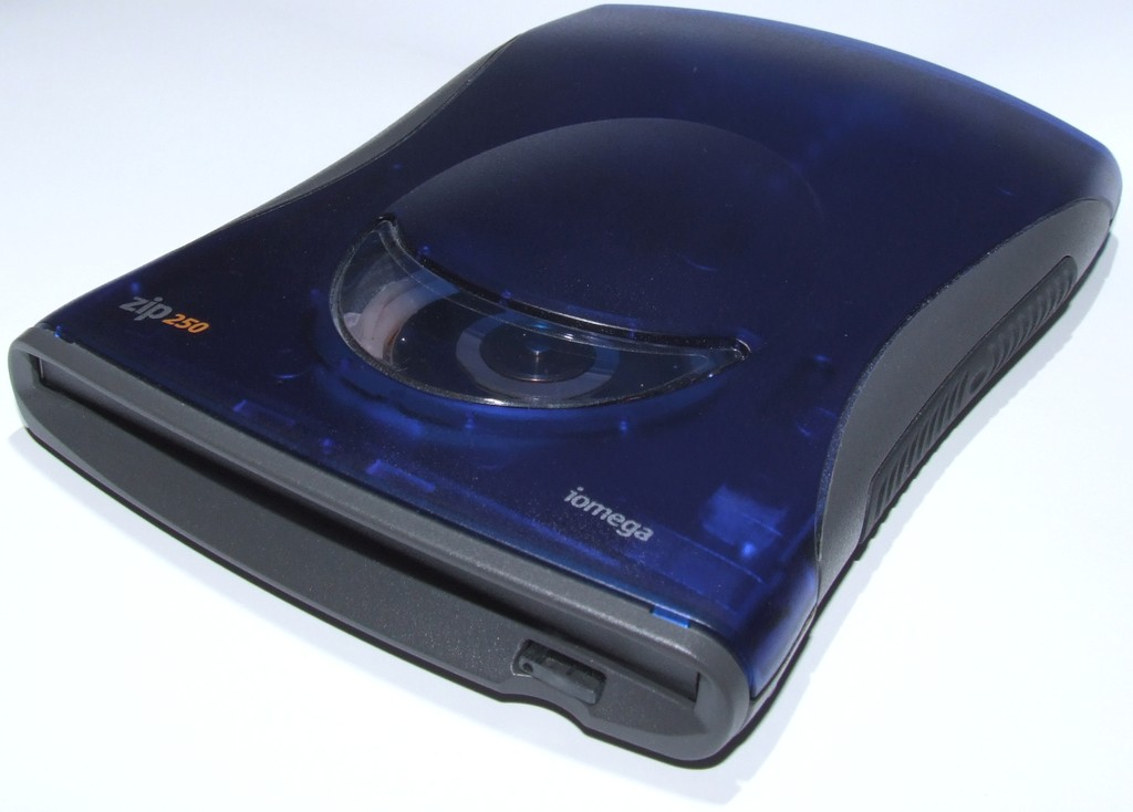 Quelle: selbst fotografiert, 03/2007 Fotograf: Späth Chr.